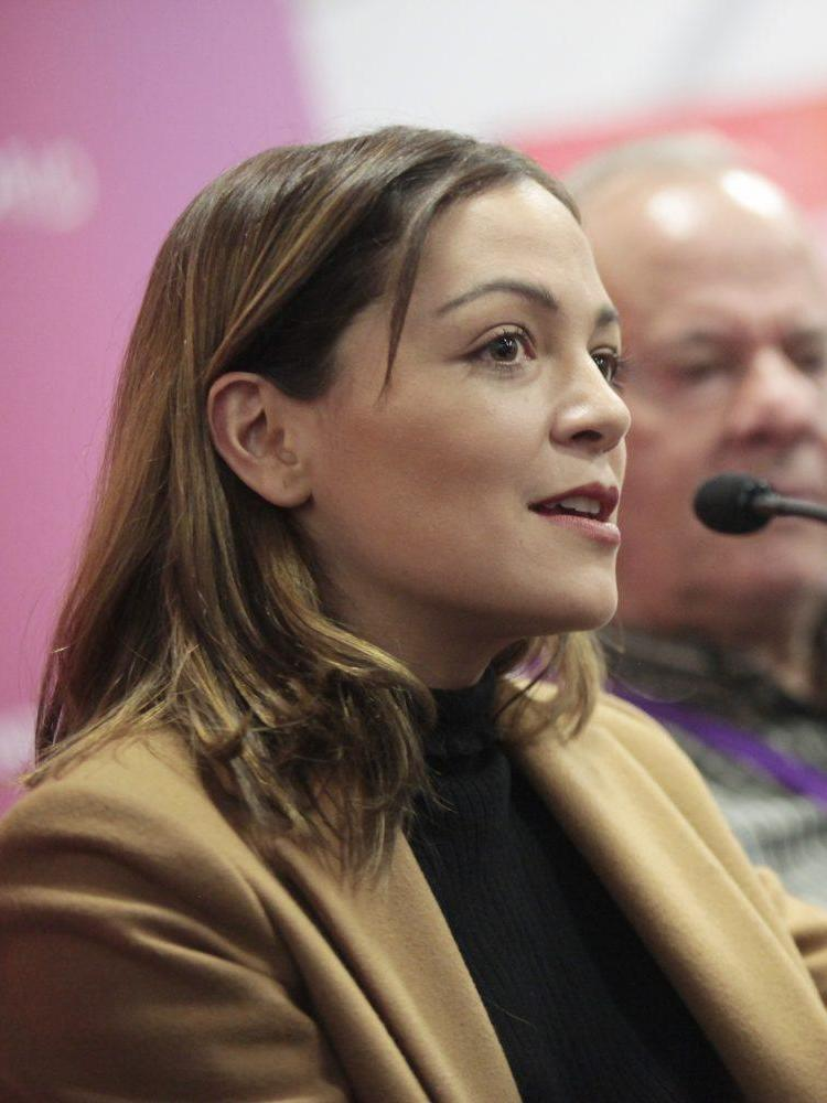 Literatura y mujer; literatura en su relación con otras disciplinas como el arte o el cine; una investigación escénica, como es Un idioma propio de Minke Wang; y la música de Leyva y Natalia Lafourcade han perfilado hoy el programa de Ganarás La luz en la Feria Internacional del Libro de Guadalajara. Literatura con nombre de cuatro mujeres: Elena Poniatowska, Soledad Puértolas, Marta Sanz y Rosa Montero. Ésta última, en solitario. Las otras combinando tándem: Poniatowska y Puértolas; Puértolas y Marta Sanz. Una jornada para analizar motivaciones, proyectos, procesos creativos… y más.